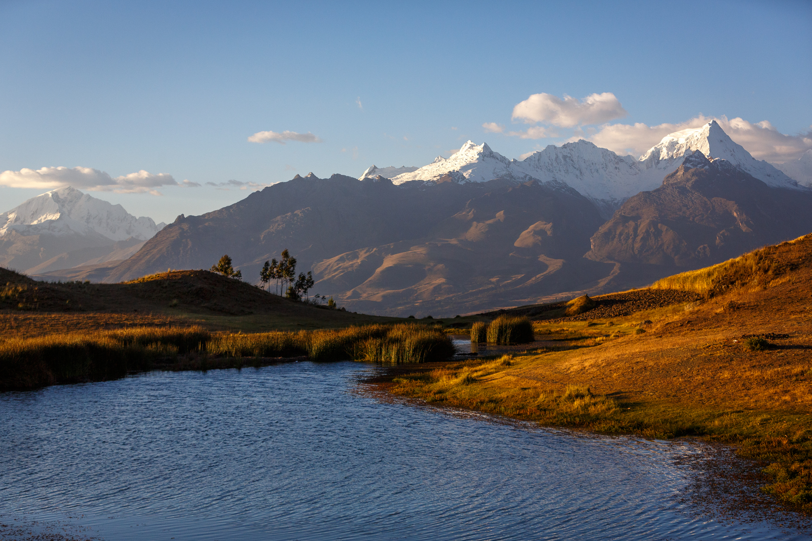 Laguna Wilcacocha, Huaraz - Ancash - Peru.